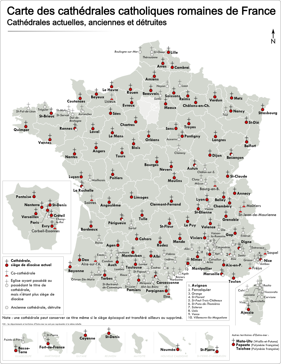 Carte des cathédrales du culte catholique romain en France